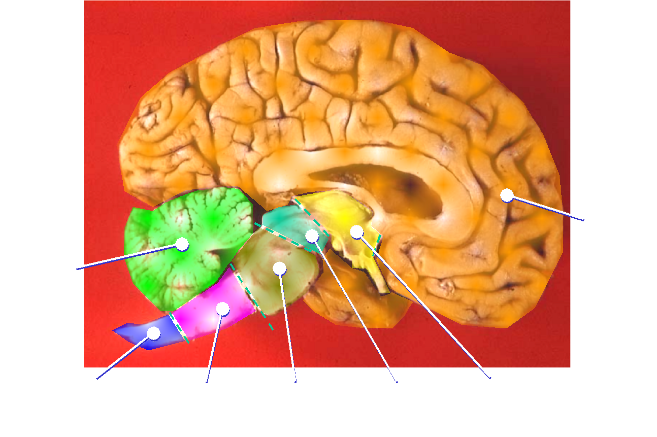 Human brain - midsagittal cut